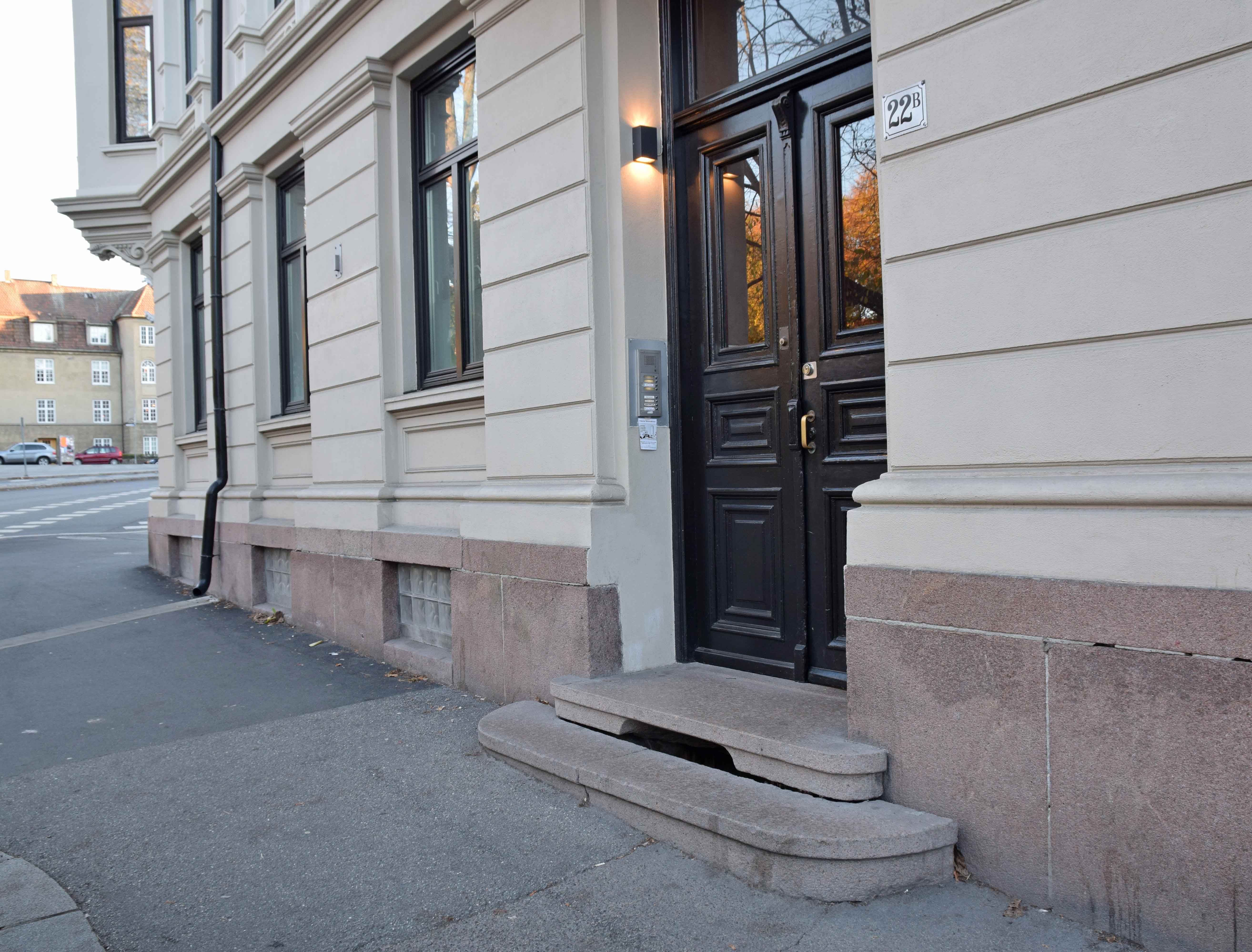 Sokkel på leiegård, Ullevålsveien 22, St. Hanshaugen, sannsynligvis bygget i 1890-årene, i sannsynligvis grorudsyenitt